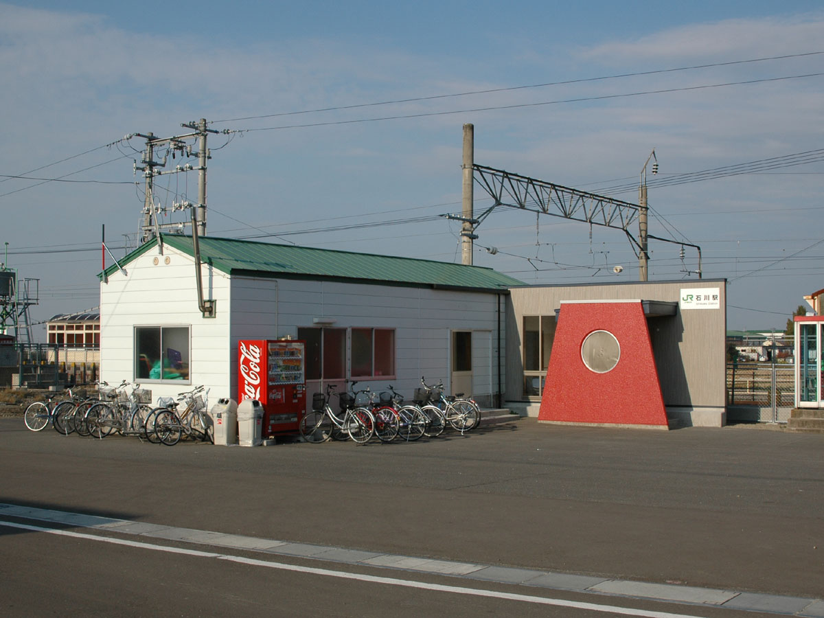 JR石川駅 2006/11/04